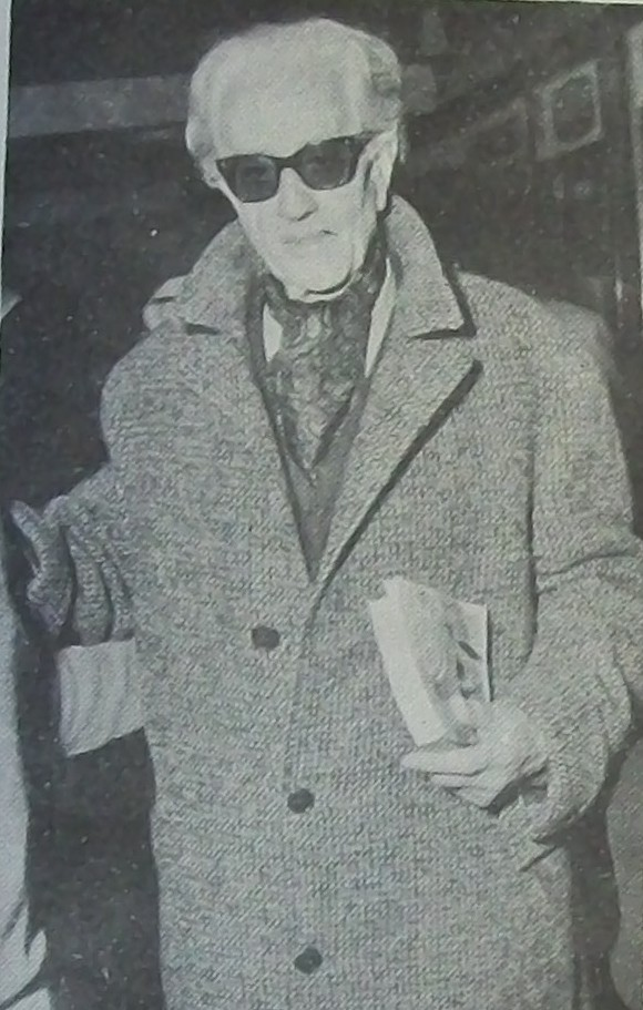 Álvaro Yundque en 1965